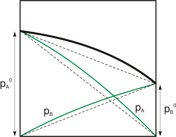 raoult deviation